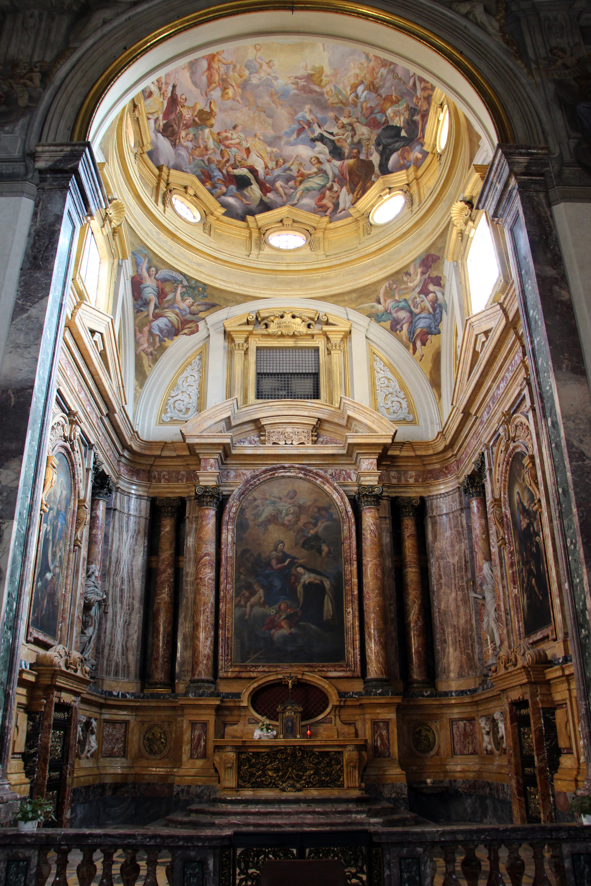 Santa Maria Maddalena de' Pazzi (Firenze) - Cappella Maggiore